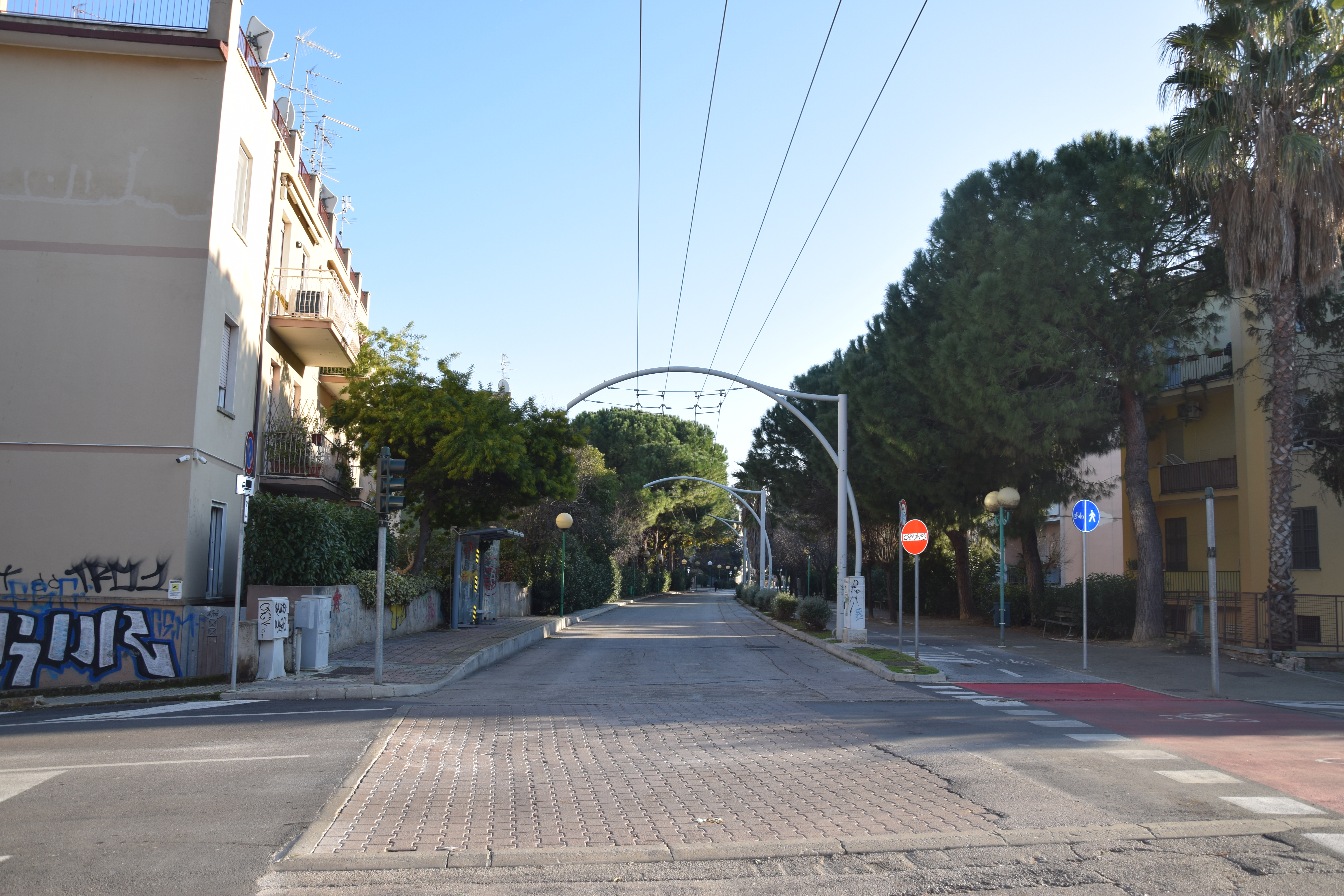 viale Castellammare Adriatico a Pescara